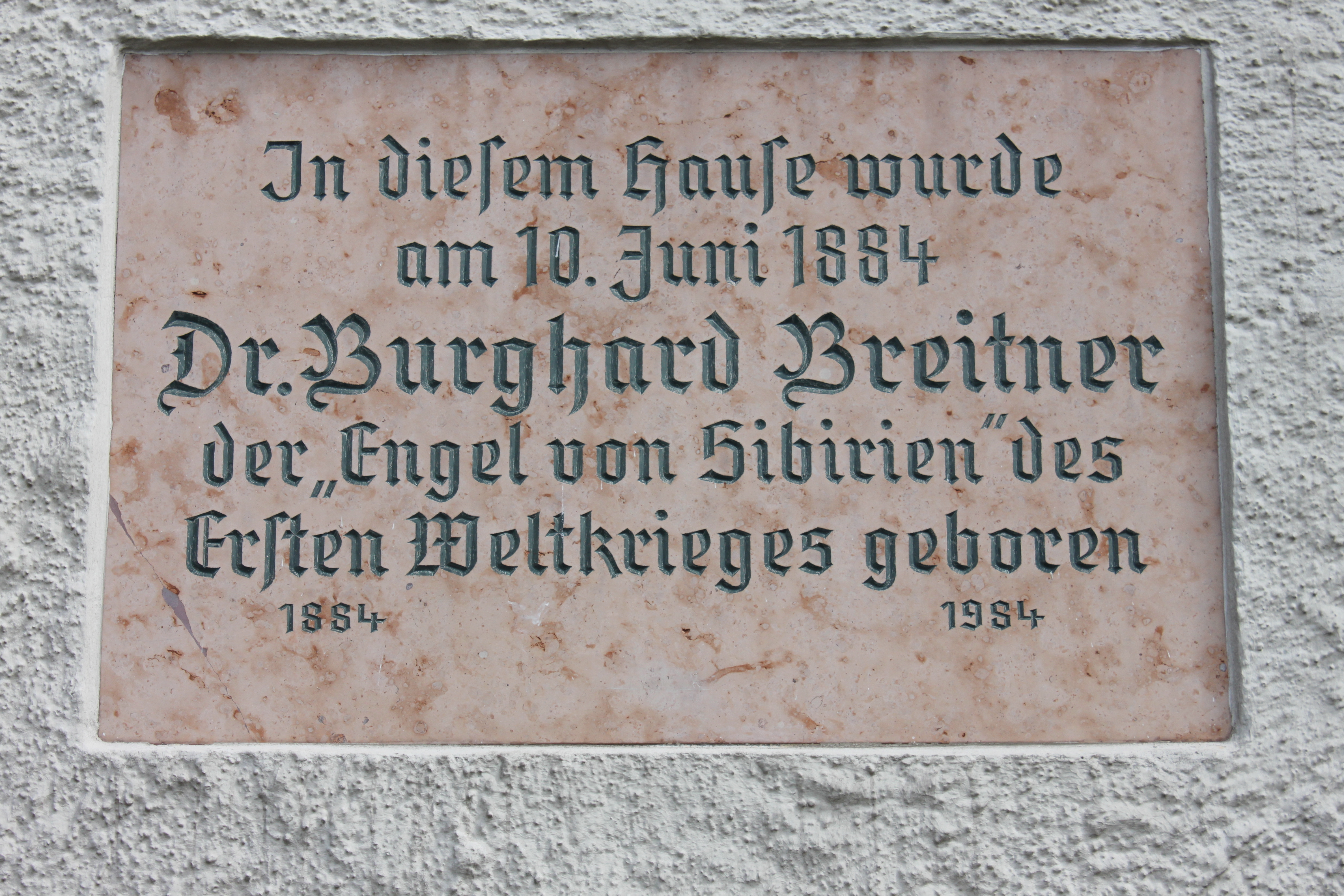 Gedenktafel am Geburtshaus in Mattsee zum 100. Geburtstag von Burghard Breitner